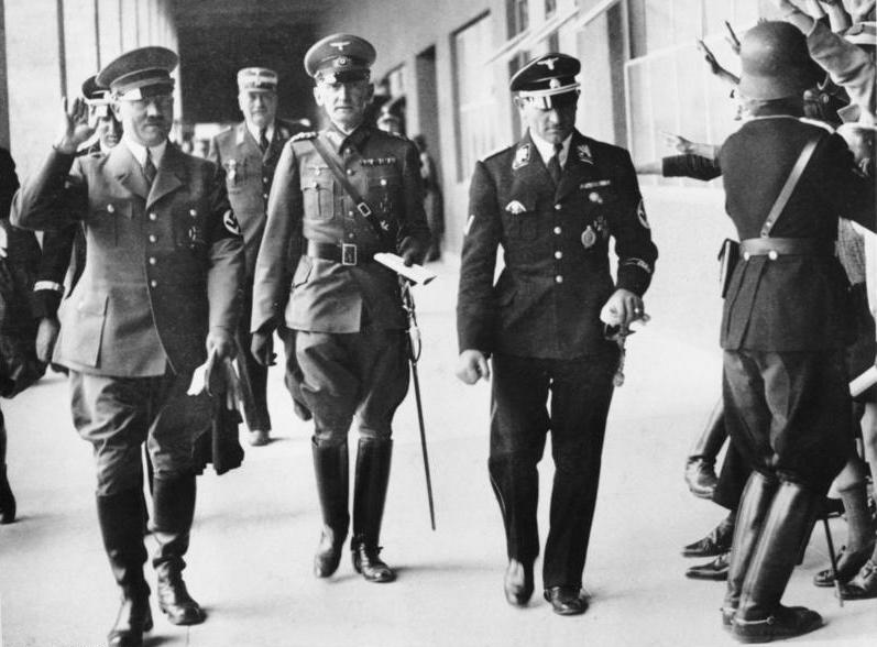 5.8.1936 Olympia 1936 Im Rahmen des modernen Fünfkampfes kam heute im Olympia-Schwimmstadion in Anwesenheit des Führers das 300m Freistilschwimmen zum Austrag. Der Führer mit dem Kommandierenden General des III. Armeekorps v. Witzleben und dem SS Obergruppenführer Joseph Dietrich beim Verlassen des Schwimmstadions.